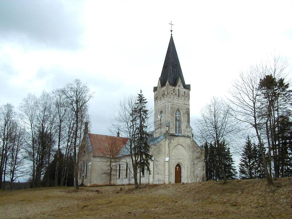 Jaunpiebalgas luterāņu baznīca 2001-04-13